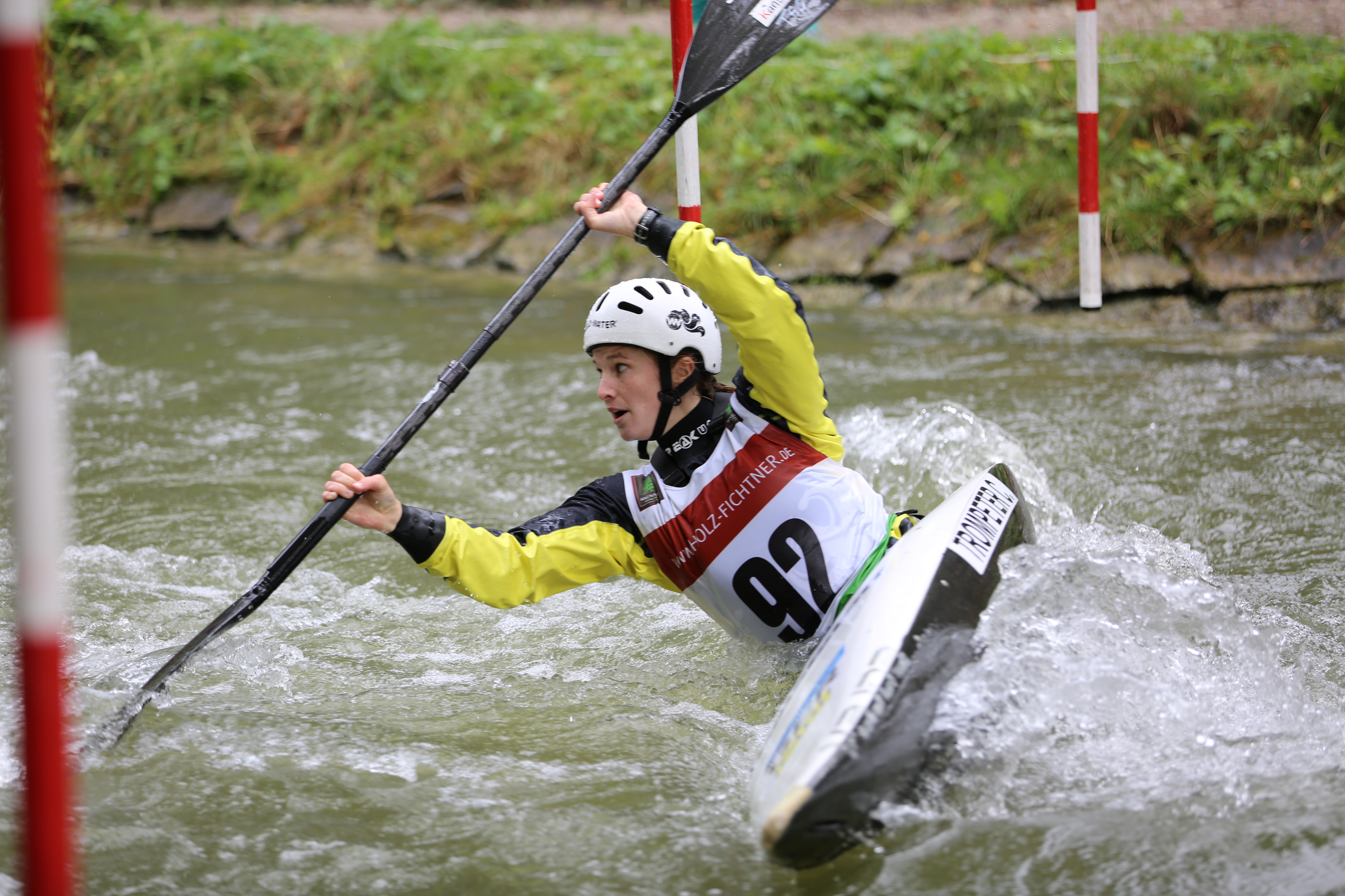 Deutsche Meisterschaft 2017 im Kanuslalom, München-Thalkirchen